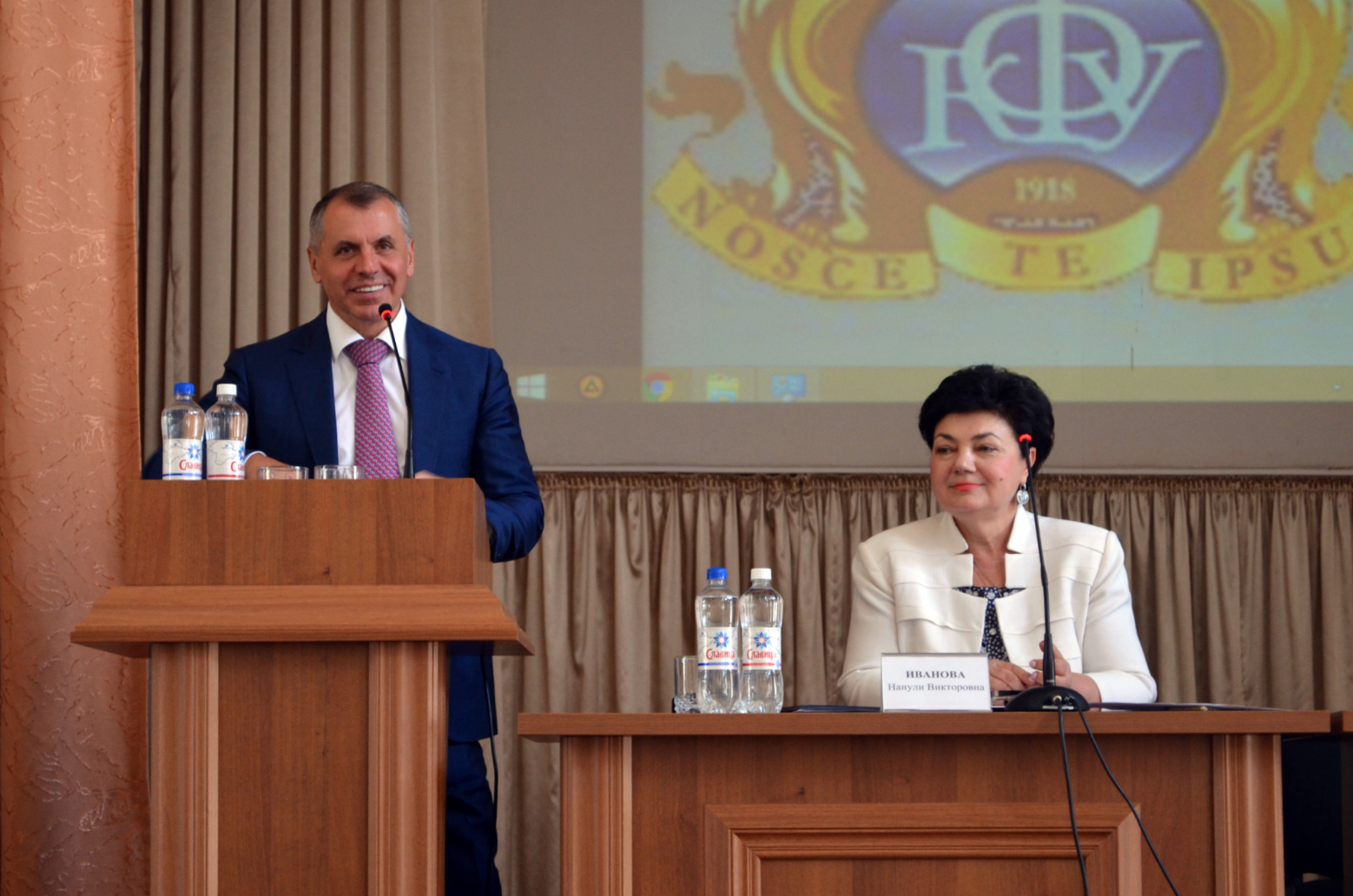 В рамках проведения Дня Государственного Совета в Республике Крым, глава муниципального образования городской округ Симферополь Республики Крым – председатель Симферопольского городского совета Виктор Агеев и Председатель Государственного Совета Республики Крым Владимир Константинов встретились с педагогическим коллективом и студентами Медицинской академии им. С.И. Георгиевского ФГАО ВО «КФУ им. В.И. Вернадского».